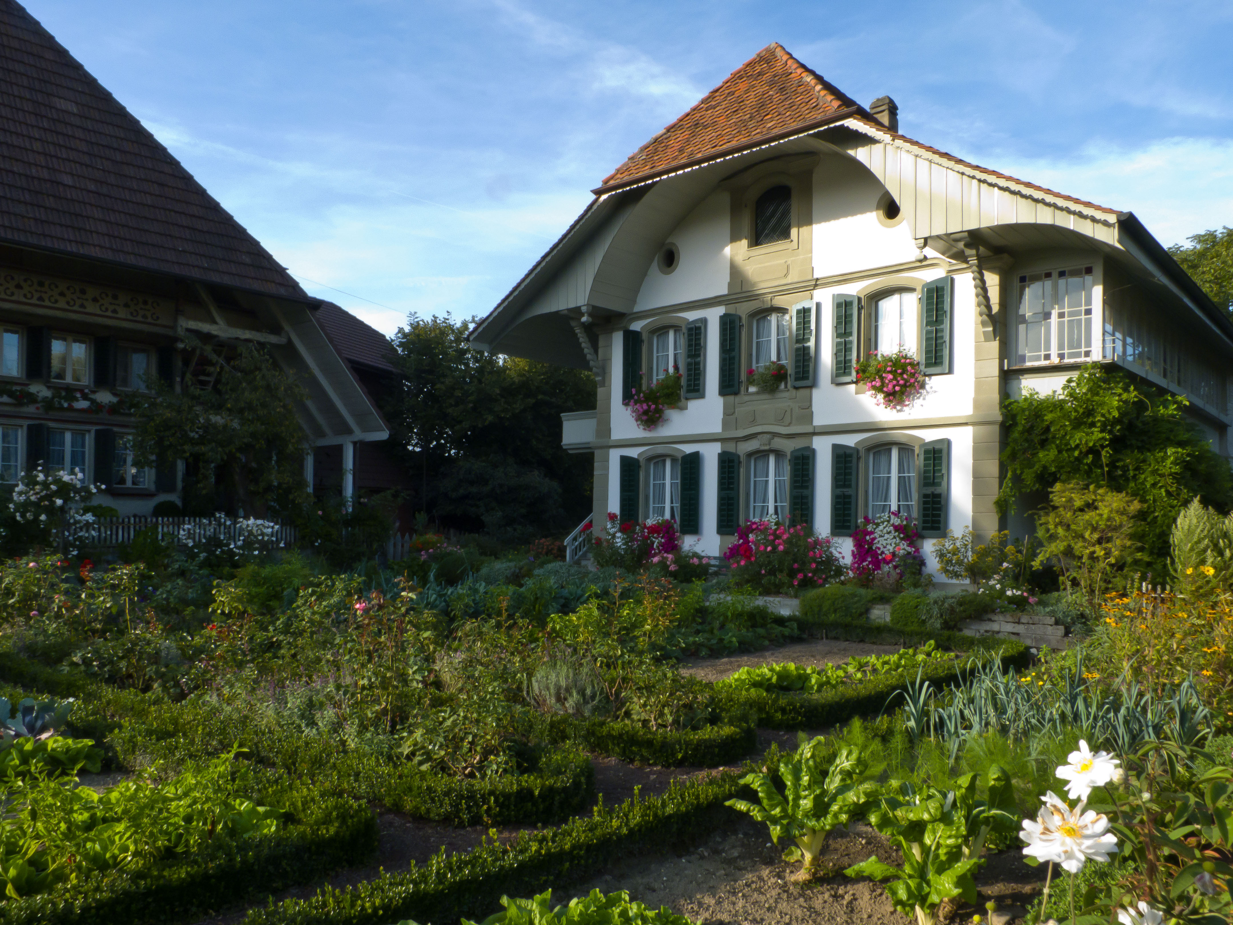 Niederösch, Stöckli